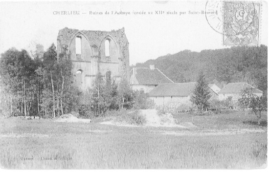 Kloster Cherlieu (Ruine), Postkarte aus der Zeit um 1900